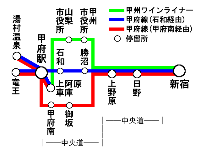 中央高速バス新宿 - 甲府線、甲州ワインライナー路線図